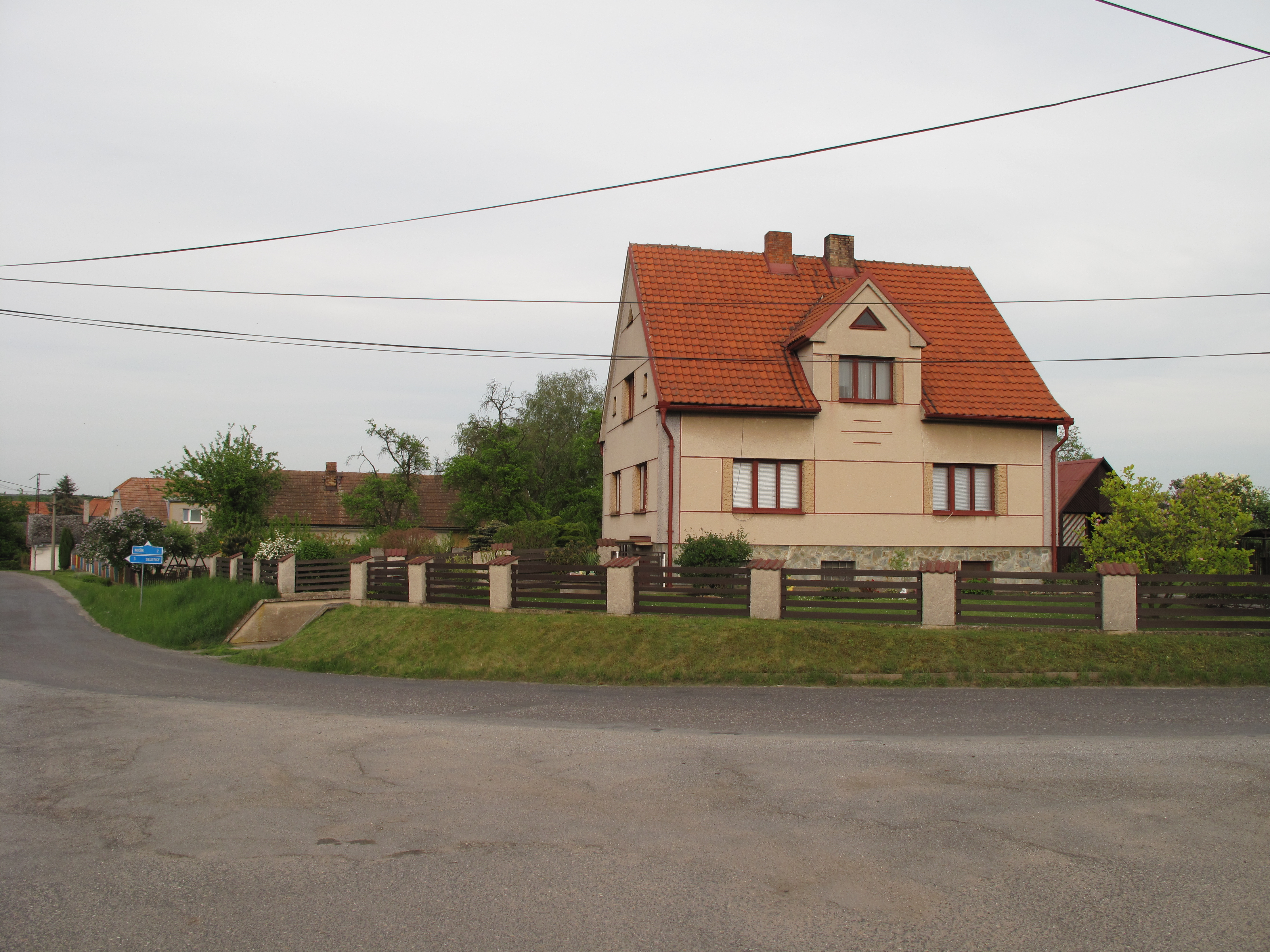 Dům v Doubravanech. Okres Nymburk, Česká republika.